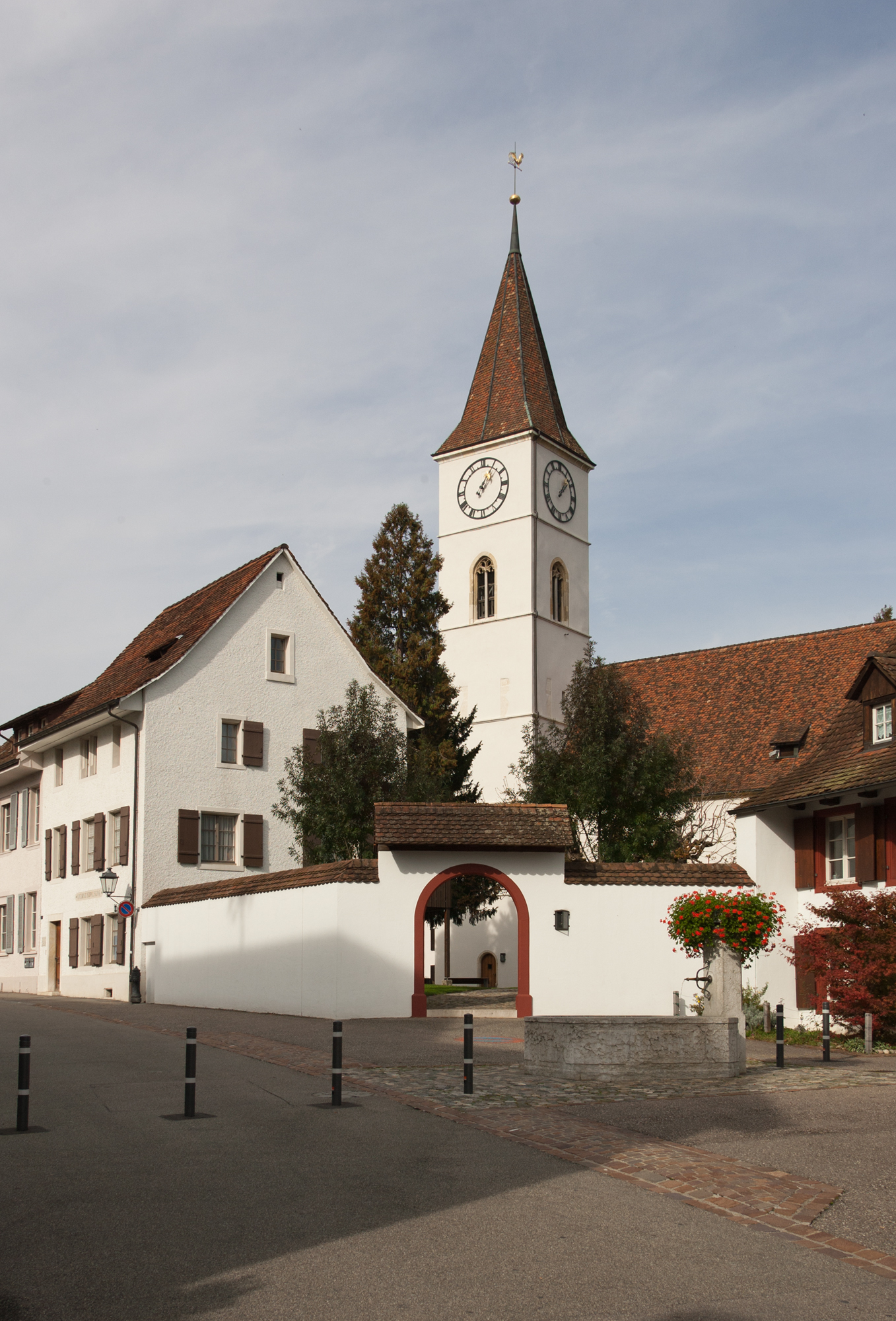 Die reformierte Pfarrkirche St. Jakob in Sissach